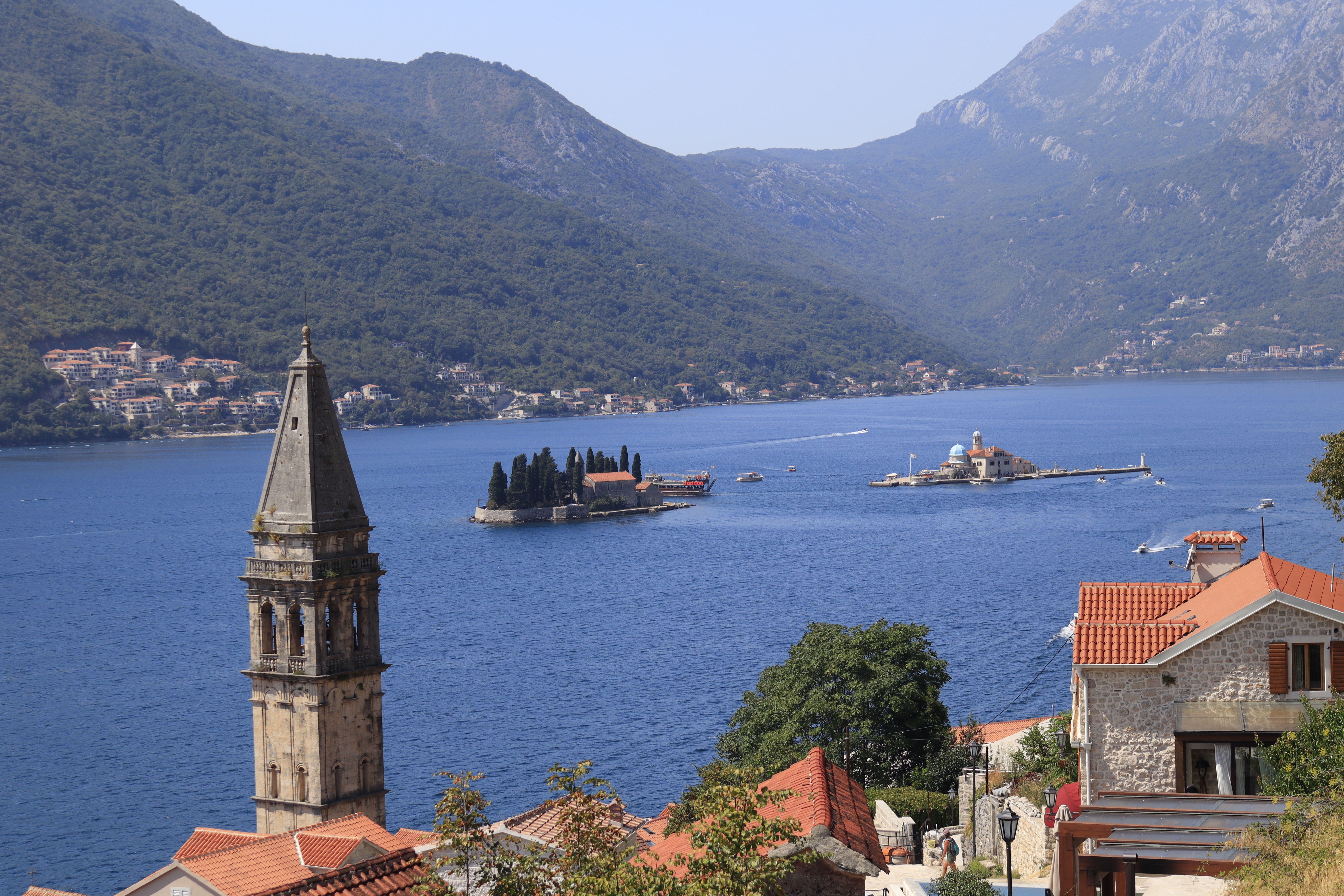 Bucht von Kotor